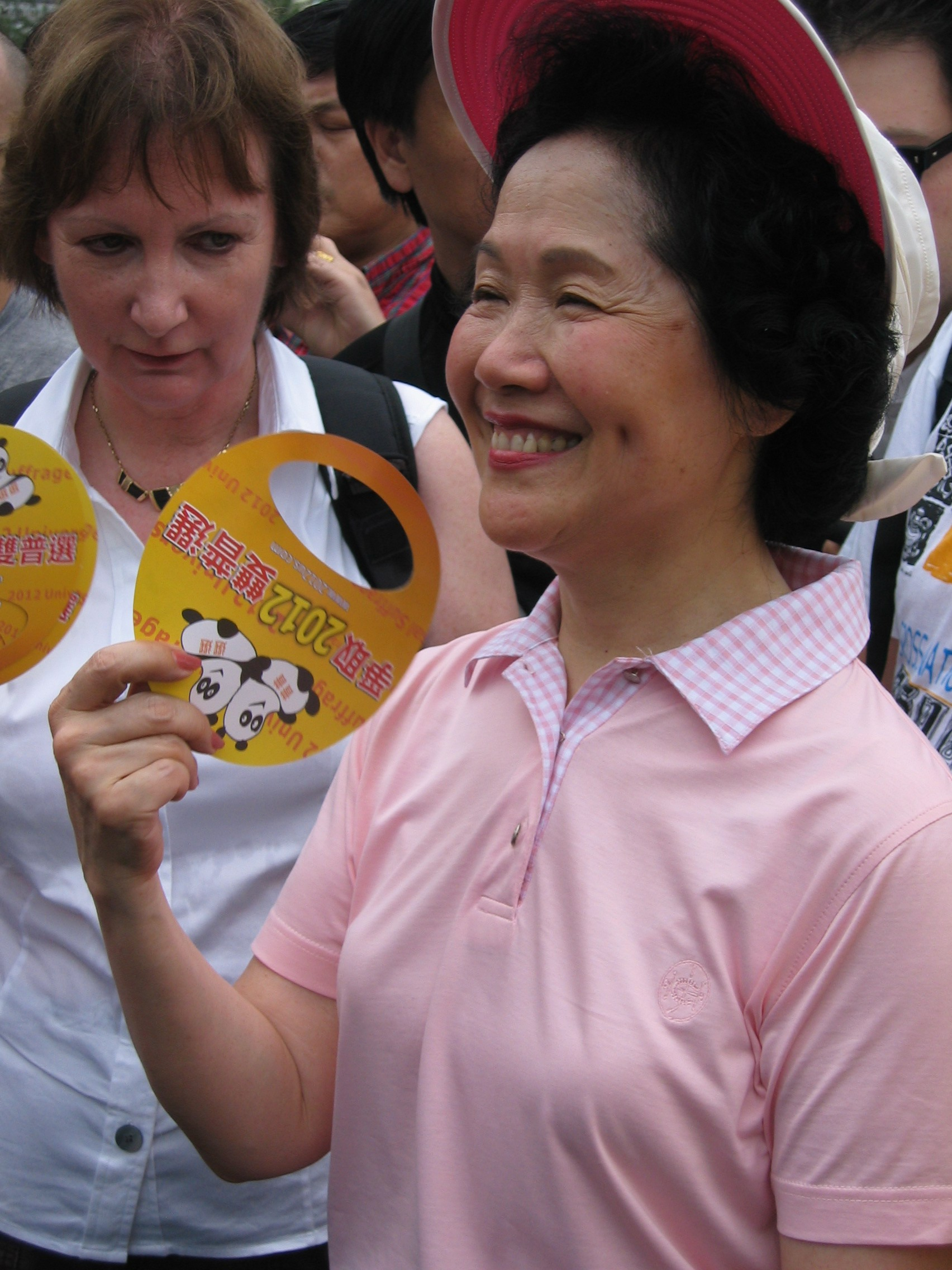 中文（香港）: 陳方安生出席2007年七一大遊行。